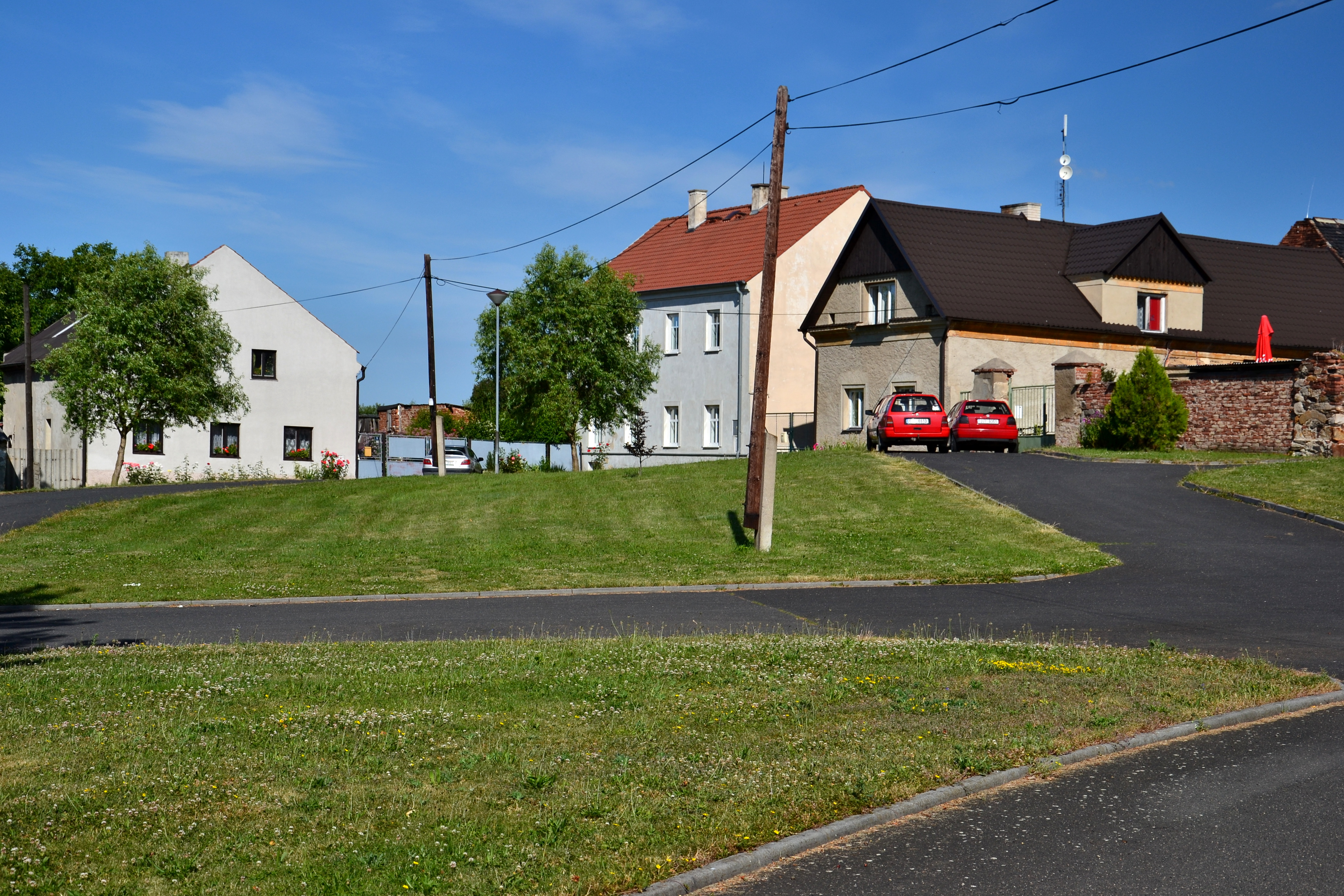 Zaječice - východní část návsi